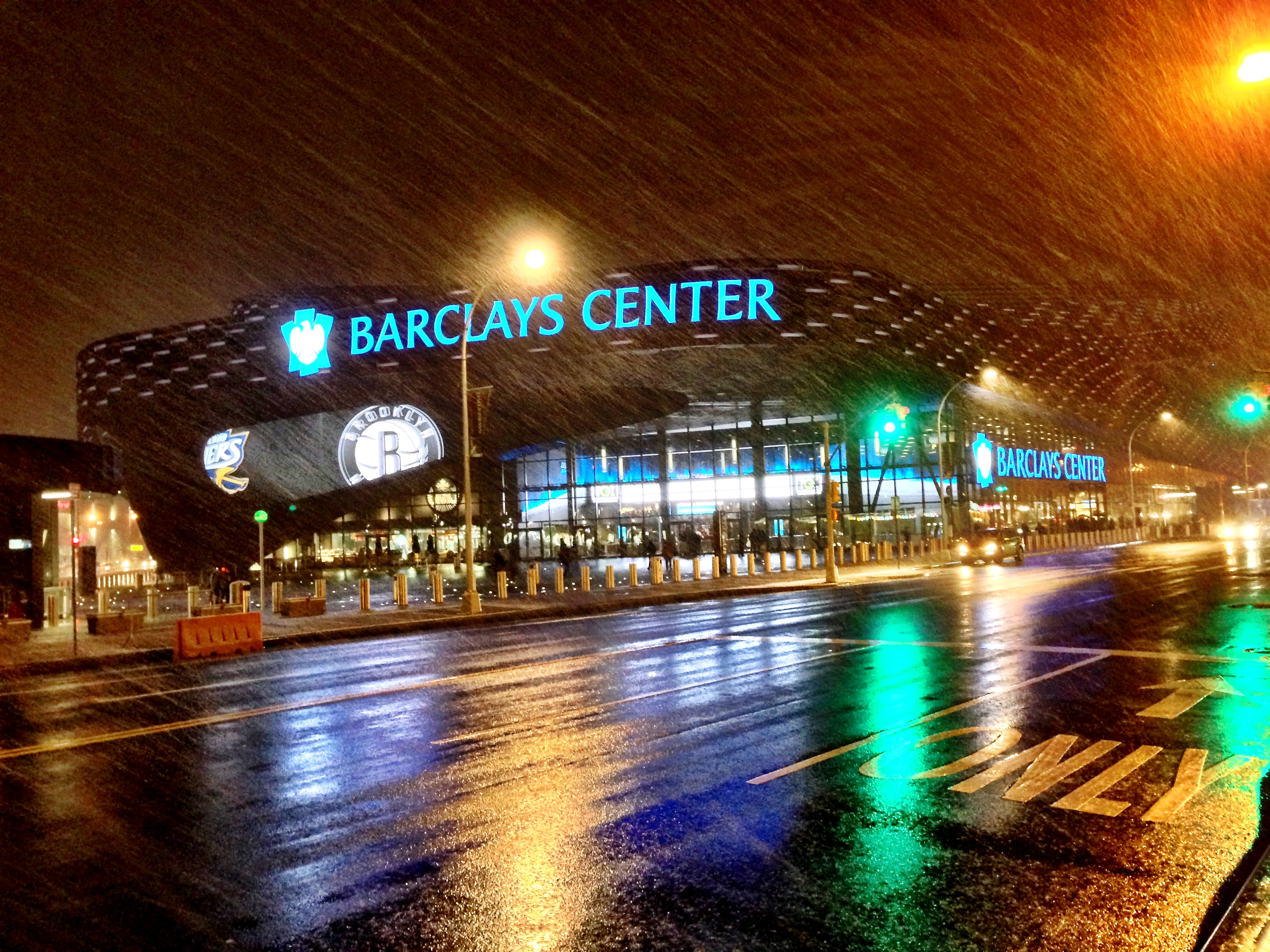 El estadio techado Barclays Center, ubicado en Brooklyn, Nueva York, bajo la lluvia.